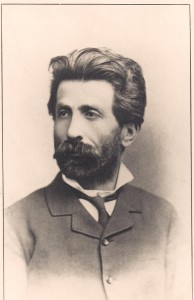 Guglielmo Andreoli (1862-1932)